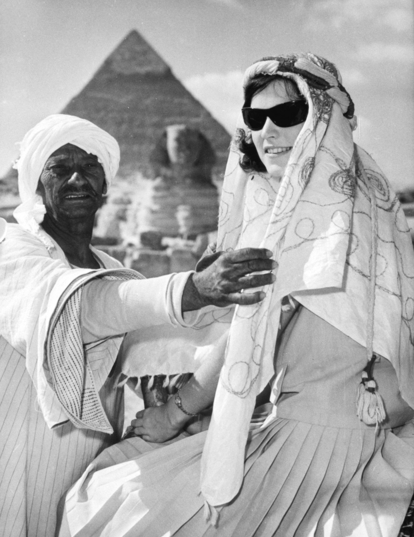 Miss Australia 1964 in Cairo. Miss Austrialia 1964 was Jan Taylor